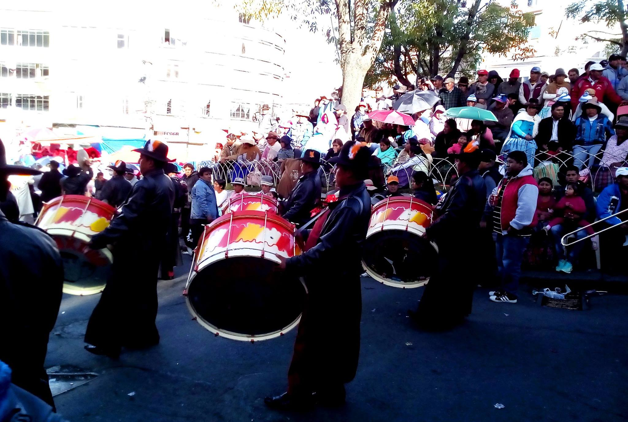 La Paz Bolivia 2017